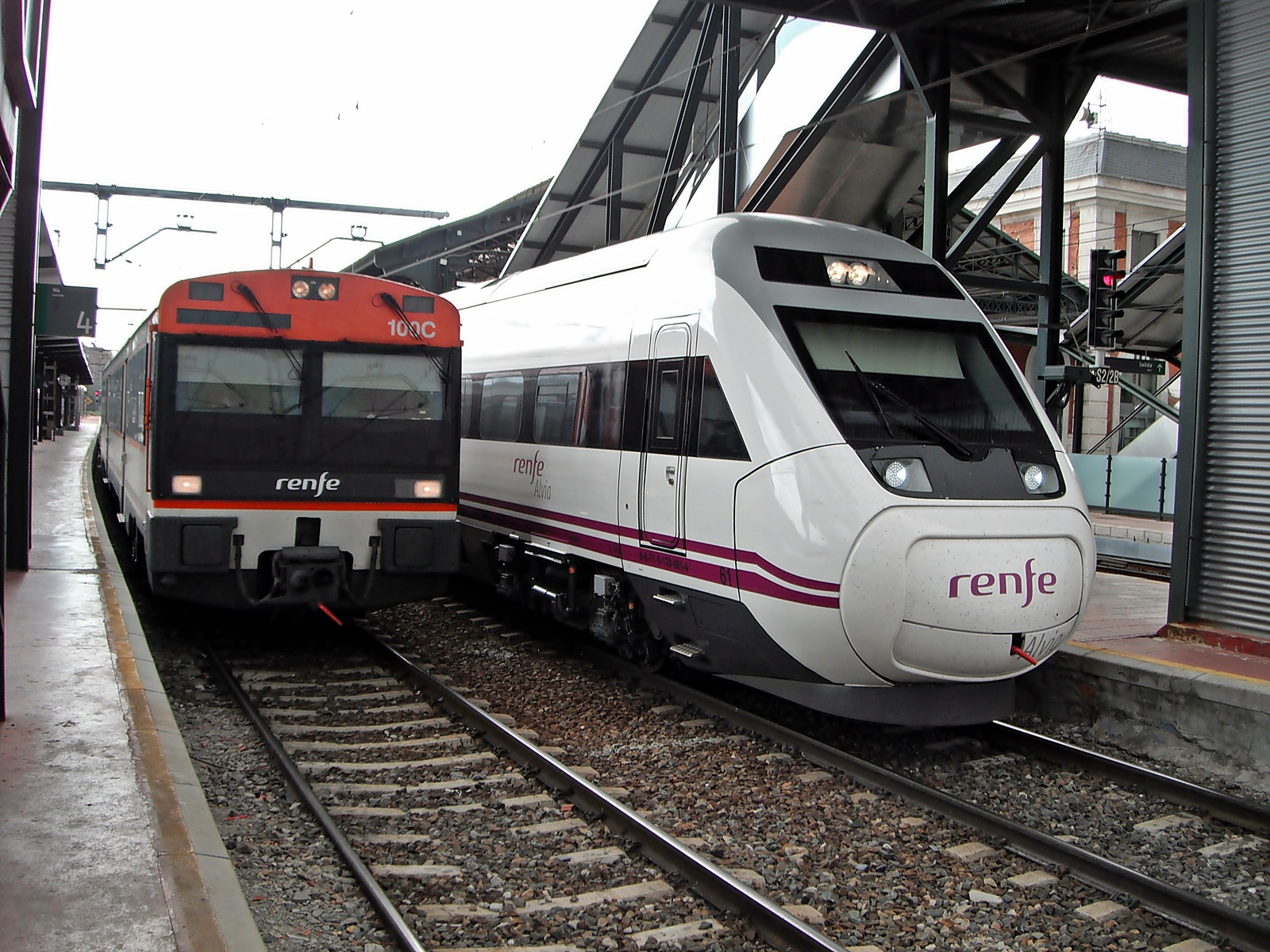 Tren Alvia Madrid-Hendaya estacionado en la estación de Valladolid-Campo Grande. Y Regional esperando su salida en la ruta Valladolid-León.